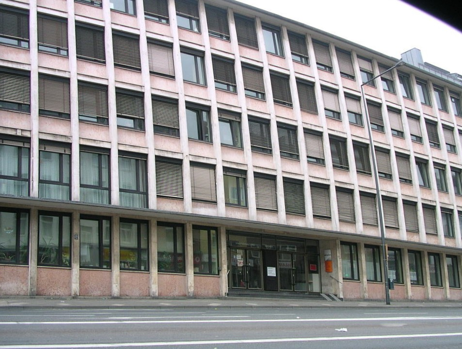 Aachen, ASEAG-Haus in der Adalbertstraße